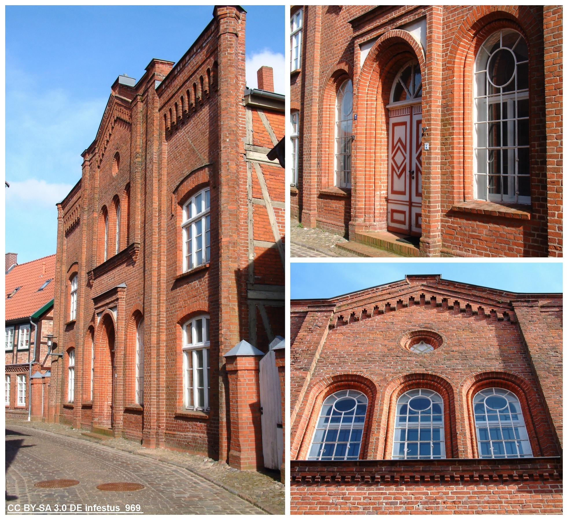 Boizenburg, ehemalige Synagoge in der kleinen Wallstraße